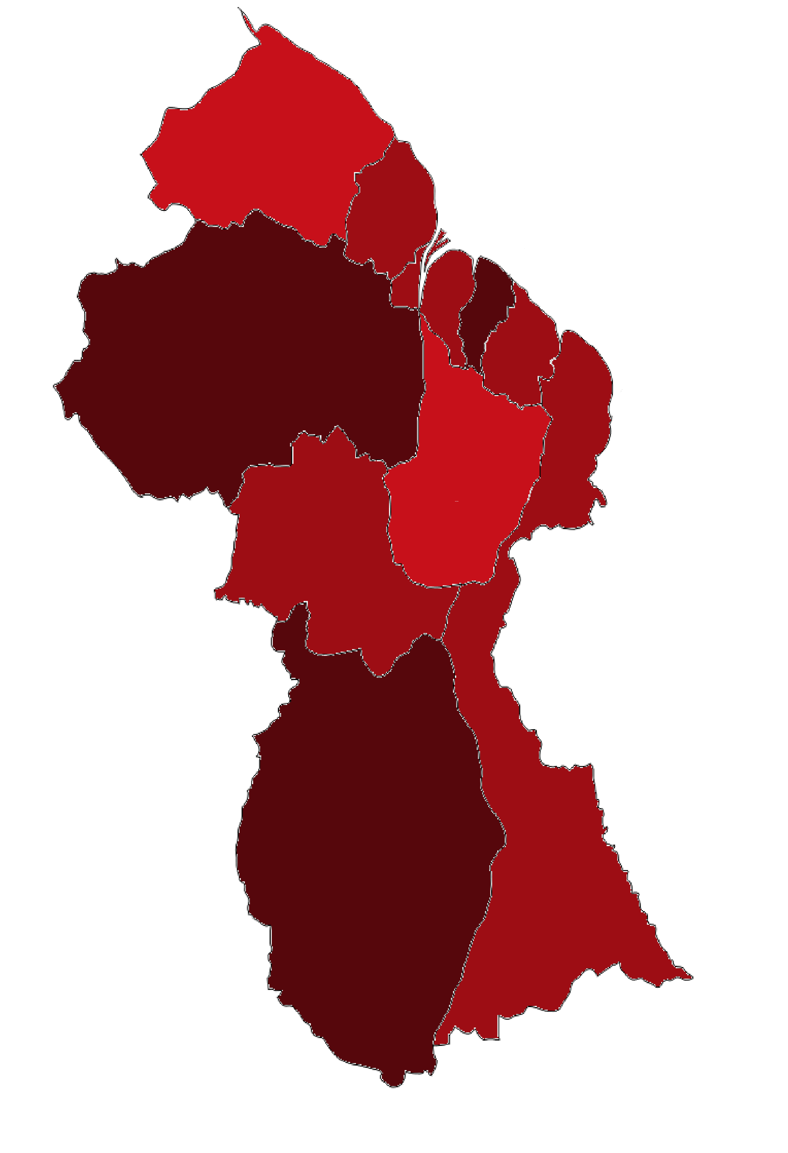 Guyana casos de coronavirus